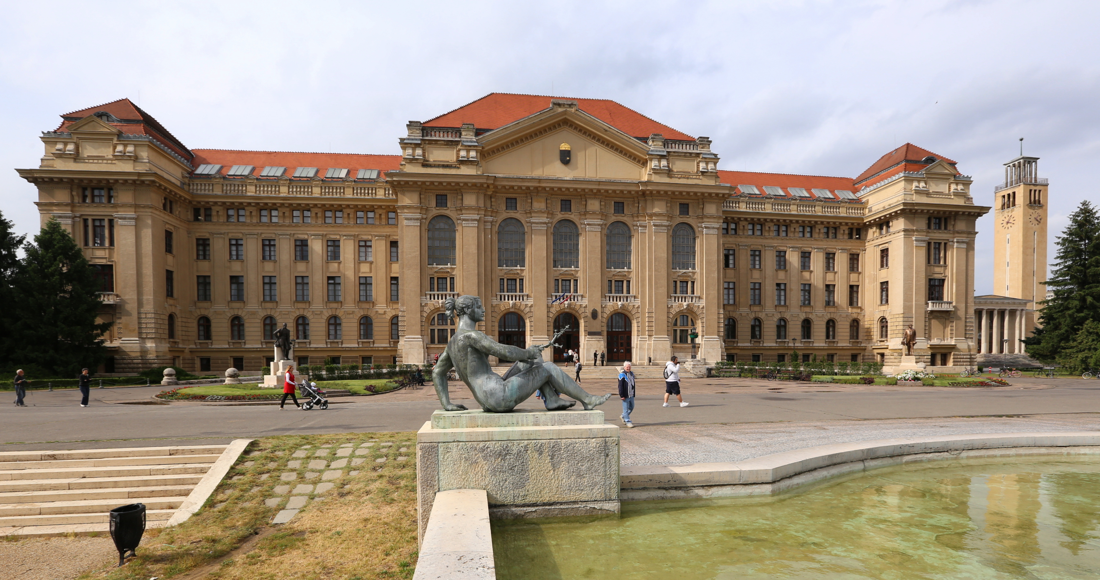 A Debreceni Egyetem Főépülete